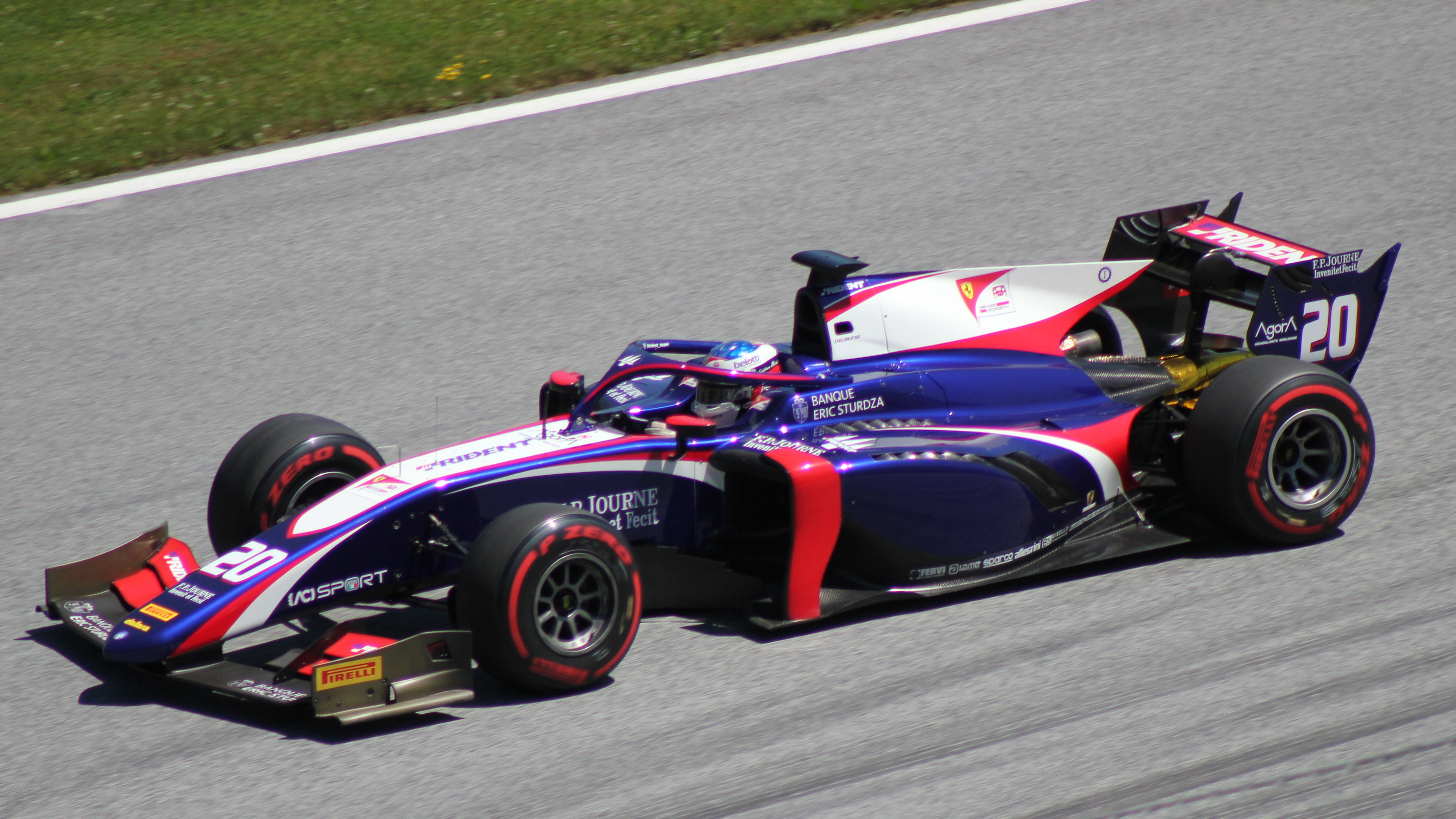 Giuliano Alesi beim Rennwochenende in Österreich 2019